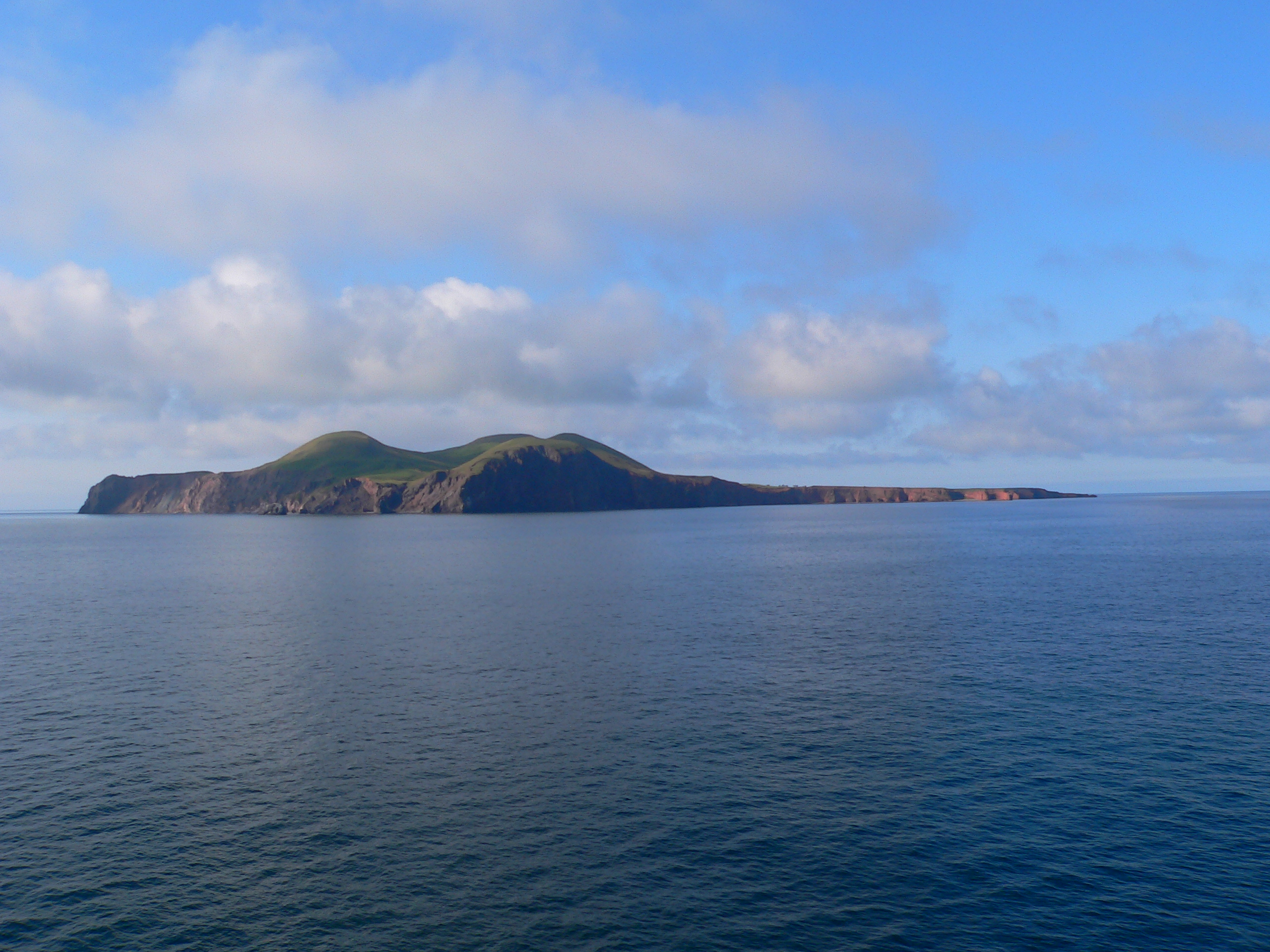 Ile d'entrée